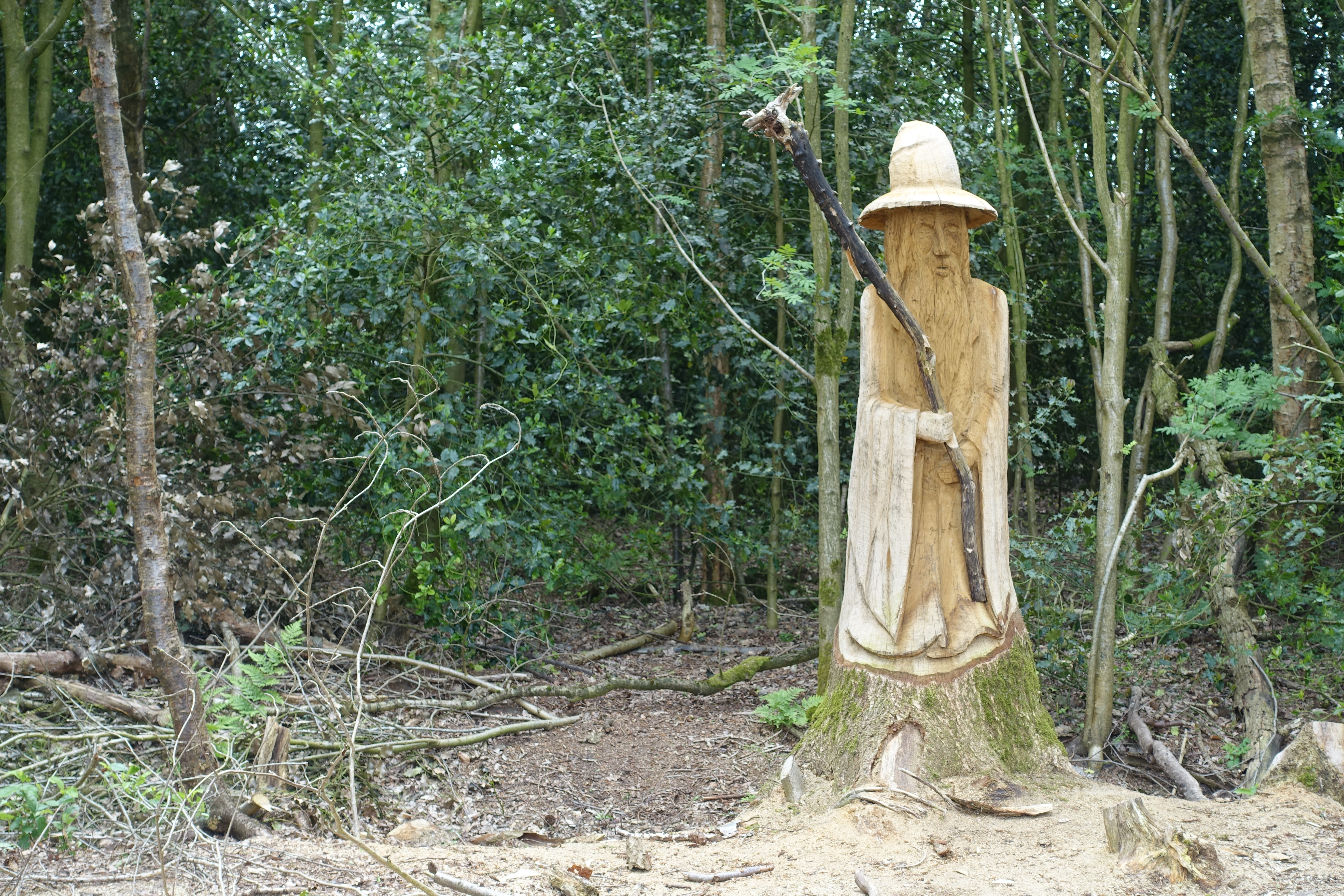 Kettingzaagkunst bij Amazonasvijver bij Sint Nyk, gemaakt door Banzai-John, levensgrote kabouter of tovenaar.